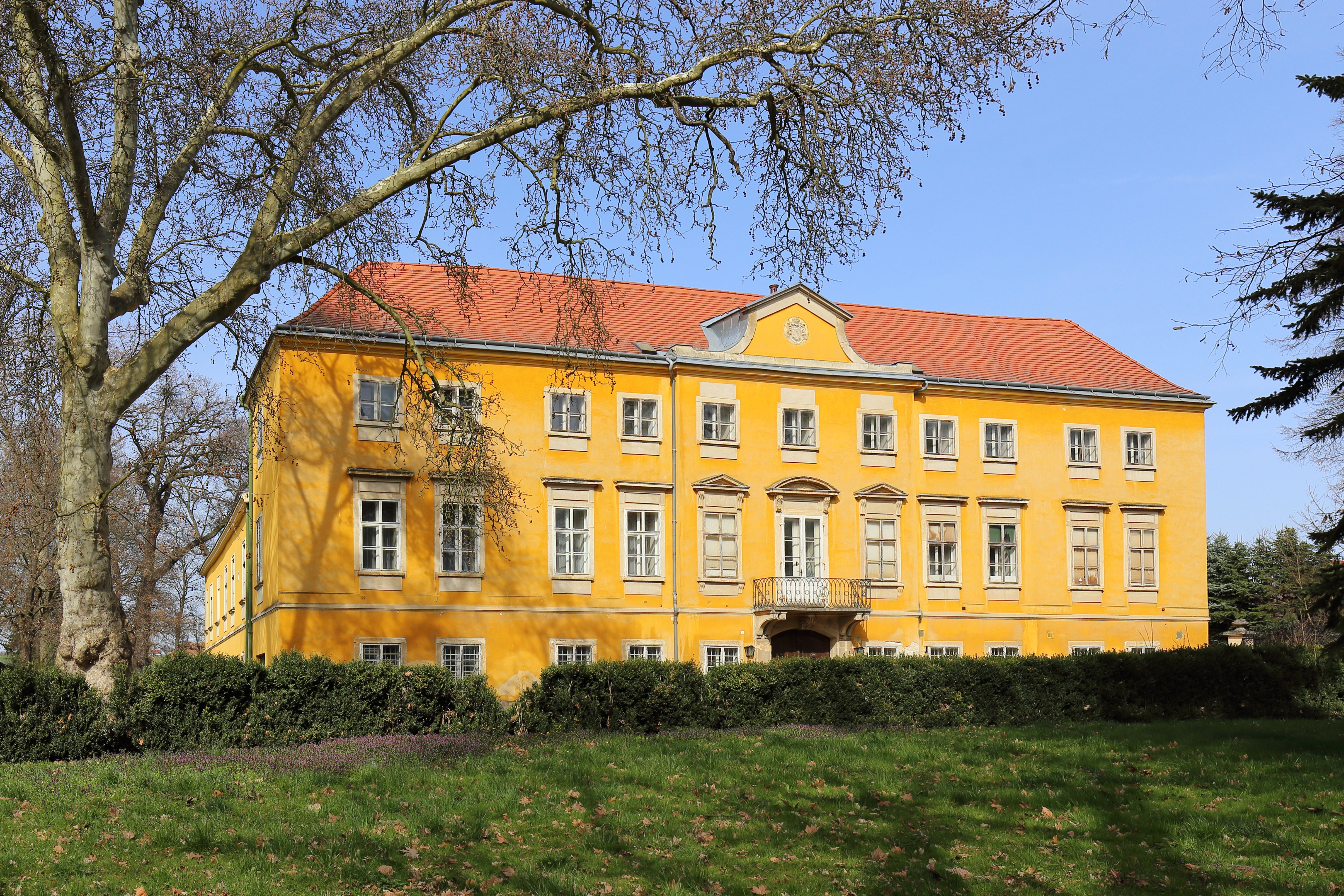 Südwestansicht des Schlosses Coburg in Walterskirchen, ein Ortsteil der niederösterreichischen Stadt Poysdorf.Das barocke Vierflügelschloss wurde 1683 unter Einbeziehung eines mittelalterlichen Vorgängerbaus errichtet. Der Haupttrakt im Süden, mit einer Fassade um 1800, ist dreigeschossig und die Nebentrakte sind zweigeschossig. Im 18. und 19. Jahrhundert wuden bauliche Veränderungen vorgenommen.